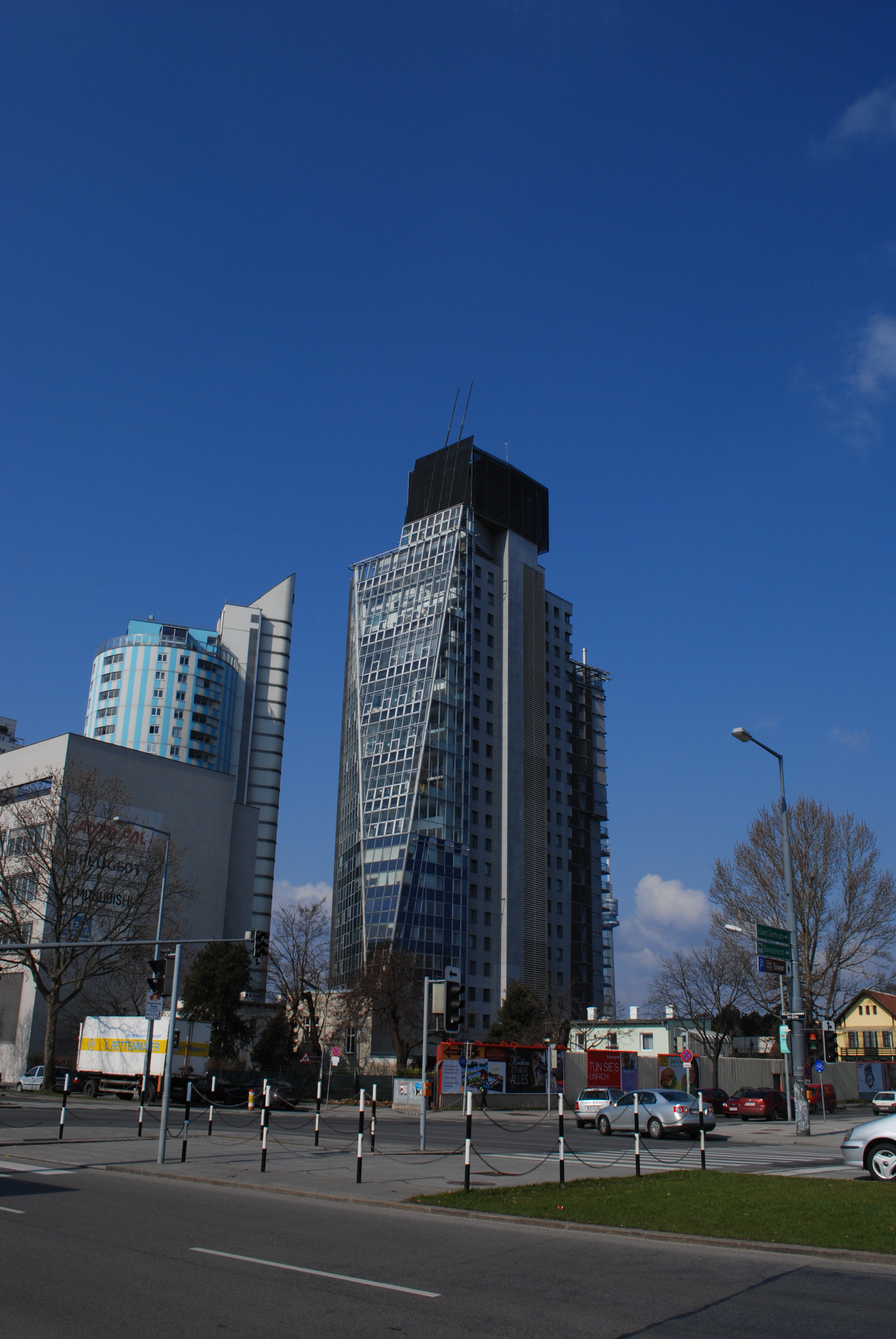 Ansicht von der Wagramer Straße